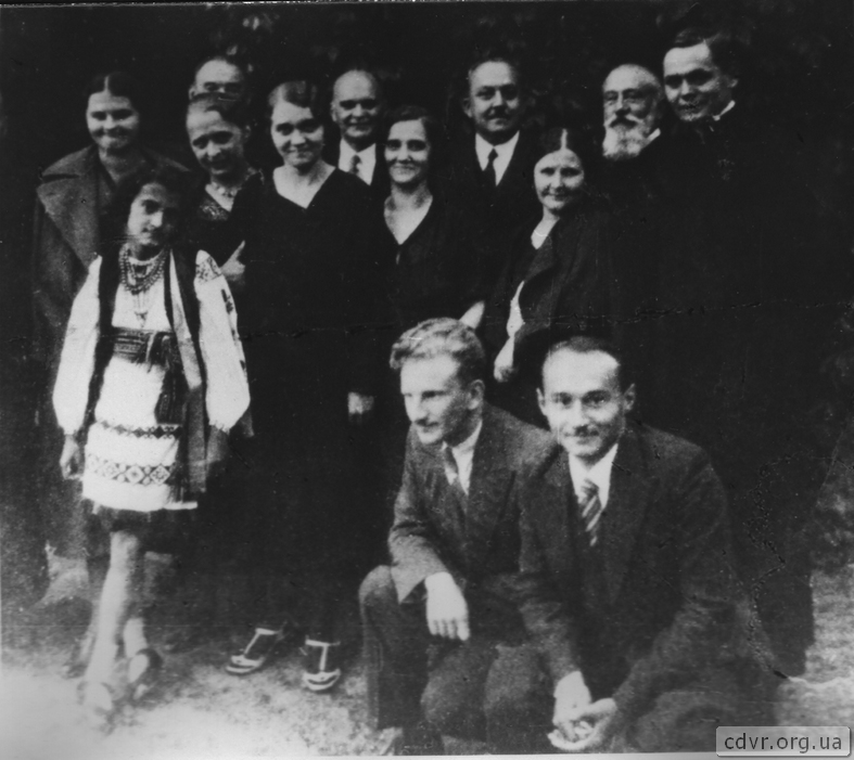 Роман Шухевич з родинами Пачовських та Березинських. У першому ряді 1-й ліворуч Роман Шухевич, У другому ряді 2-а ліворуч Наталія Шухевич (Березинська).